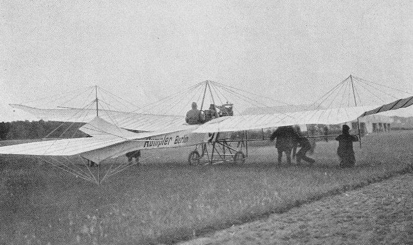 Hans Vollmöller, deutscher Flieger